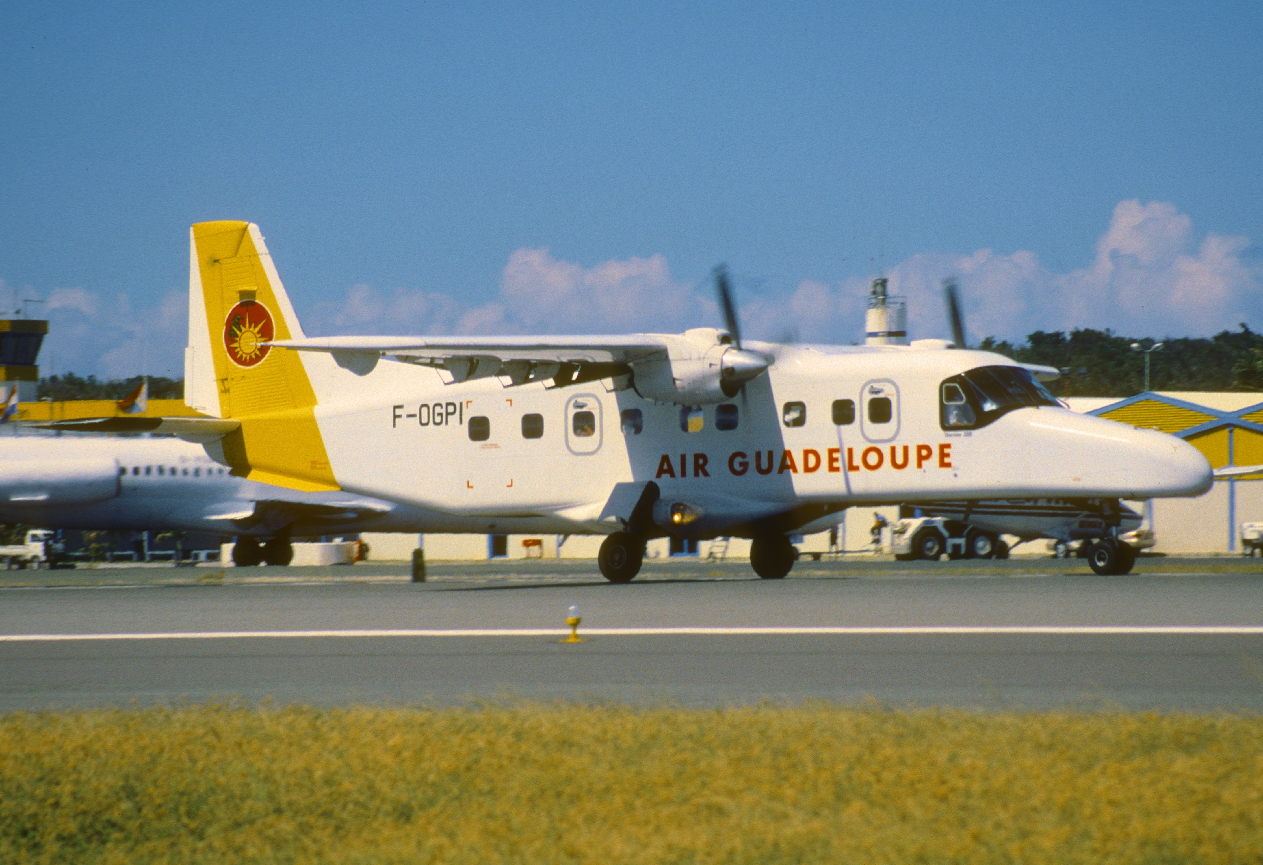 45av - Air Guadeloupe Dornier 228-202K; F-OGPI@SXM;31.01.1999